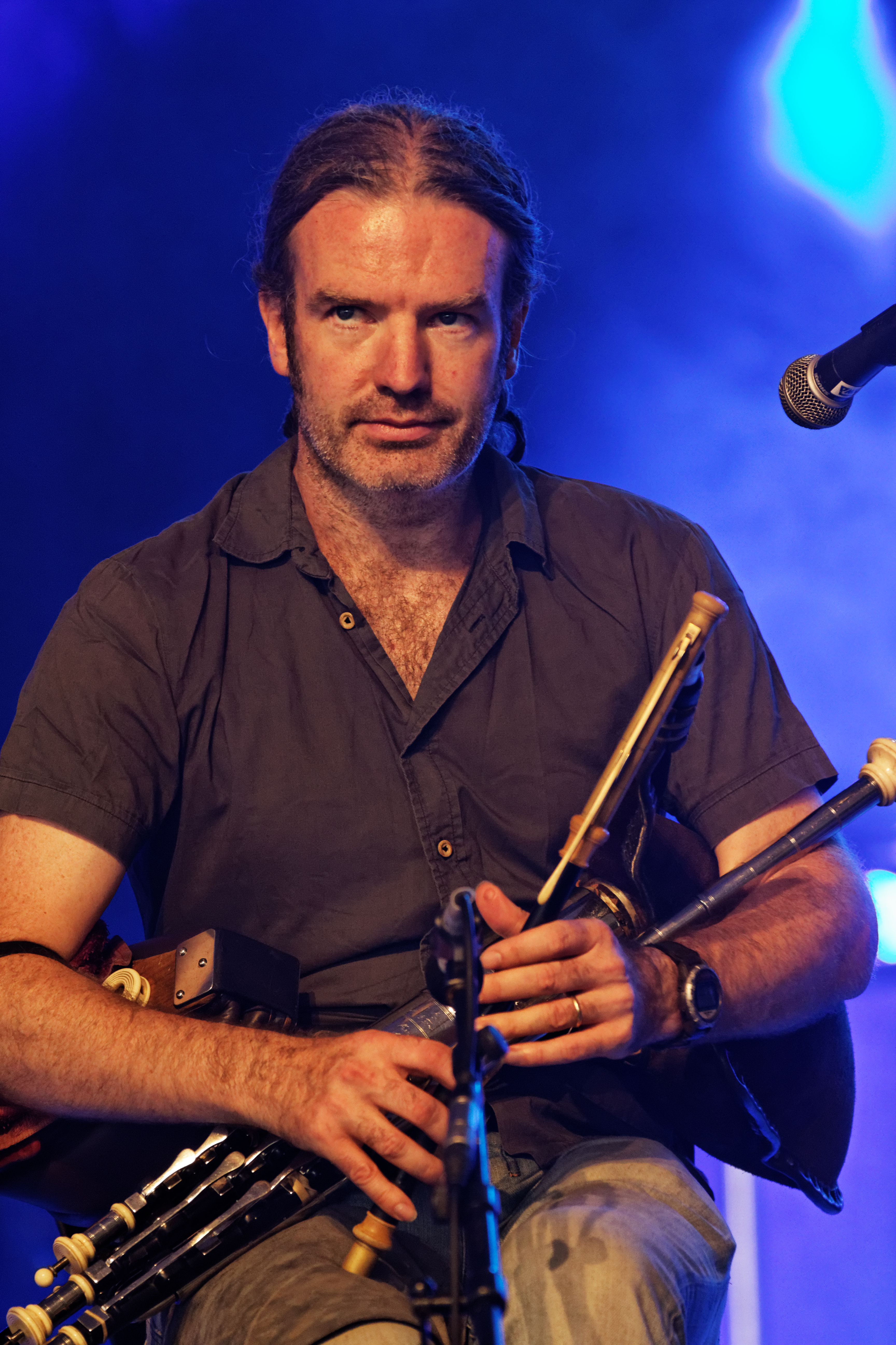 Lúnasa en concert à l'espace évêché lors du festival de Cornouaille 2013.